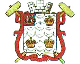 Герб Дмитрова, утверждённый в 1883 году